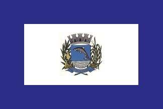 Bandeira de Corumbataí - SP - Brasil.